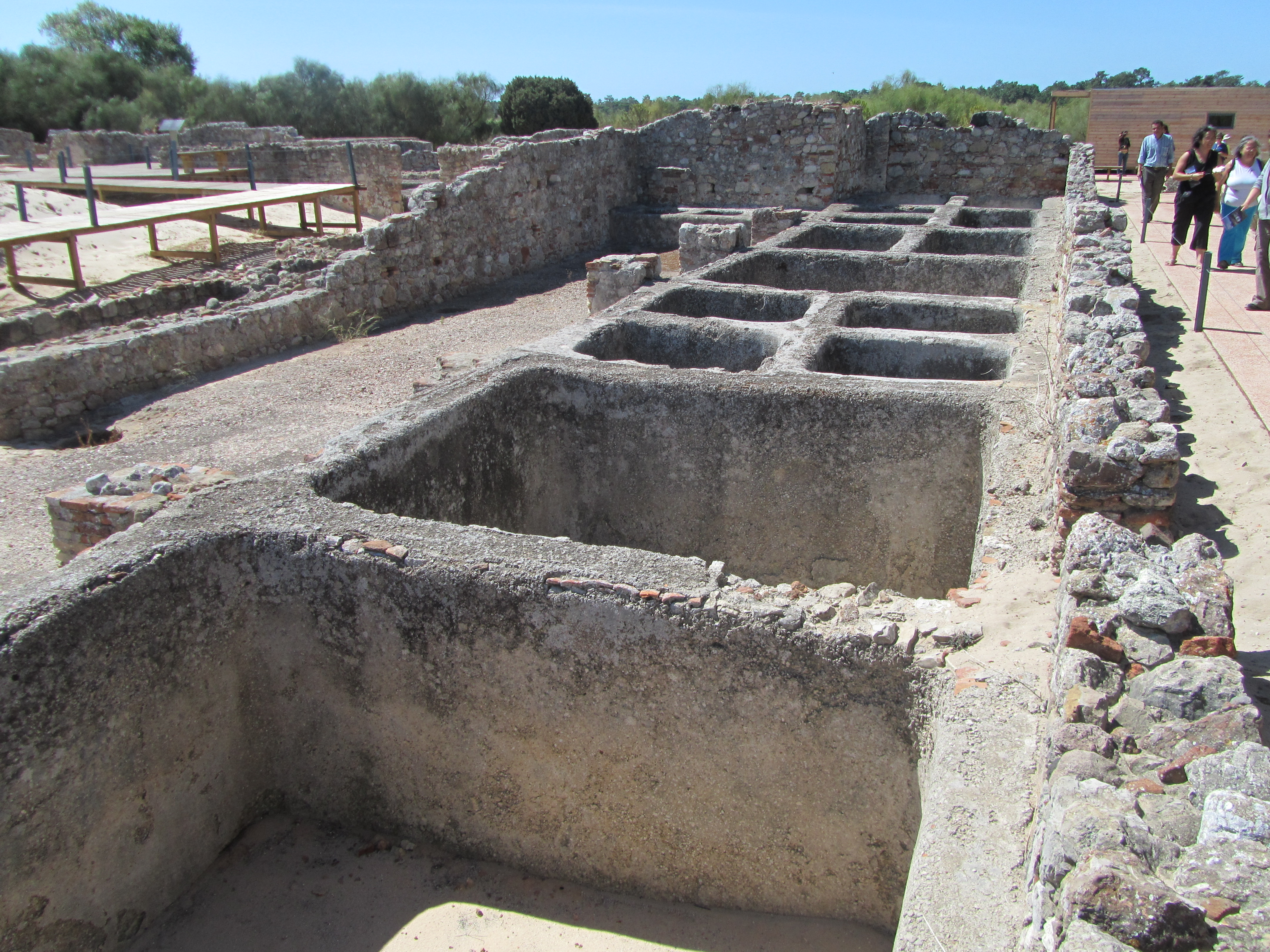 Vista geral das cetárias da oficina de salga 1 das ruínas romanas de Troia, Portugal